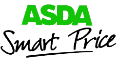 SmartPrice Logo